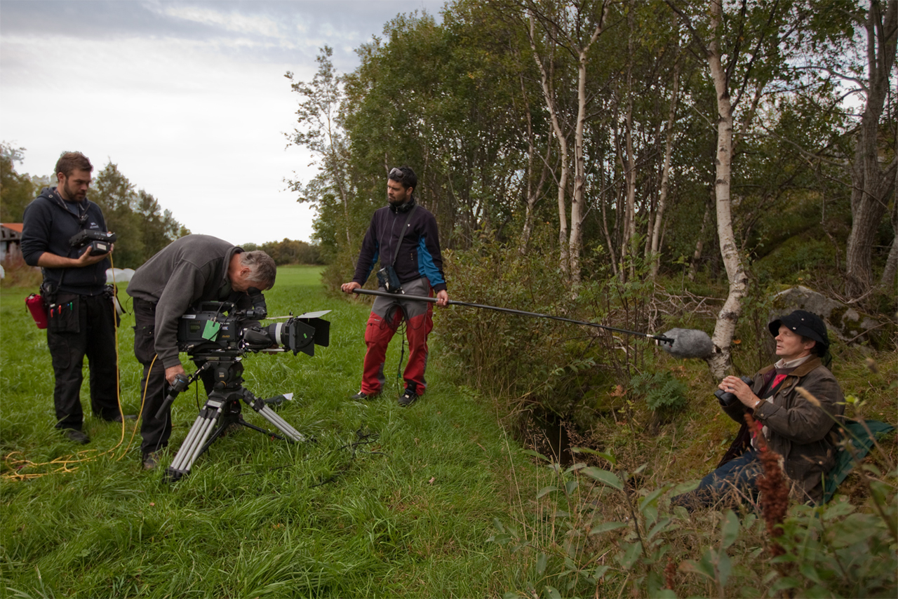 Opptak av scene til serien Himmelblå